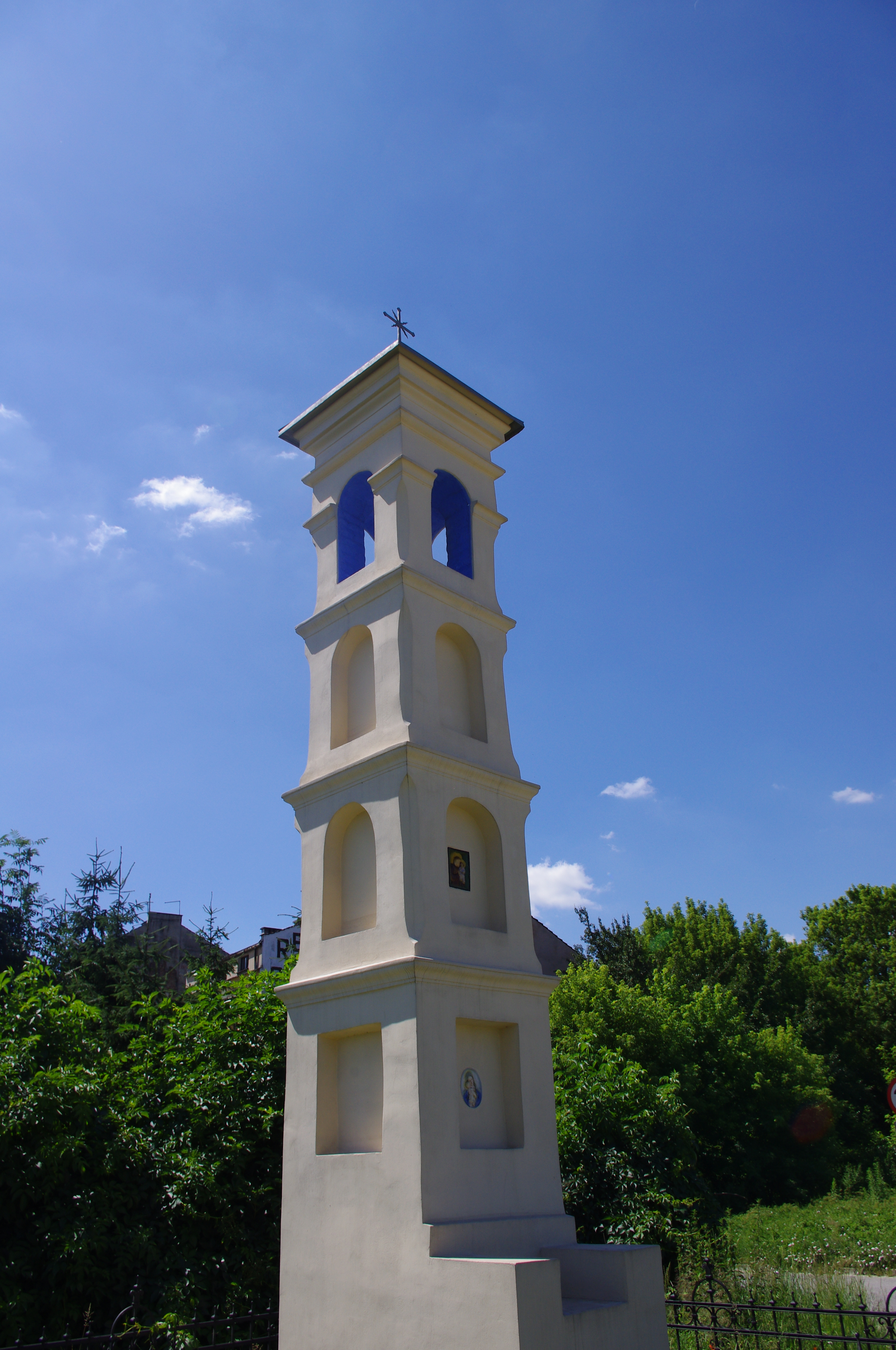 Kapliczka (latarnia umarłych) w Ludwinowie/Dębnikach / The shrine (Lantern of the Dead) in Ludwinow (Krakow)